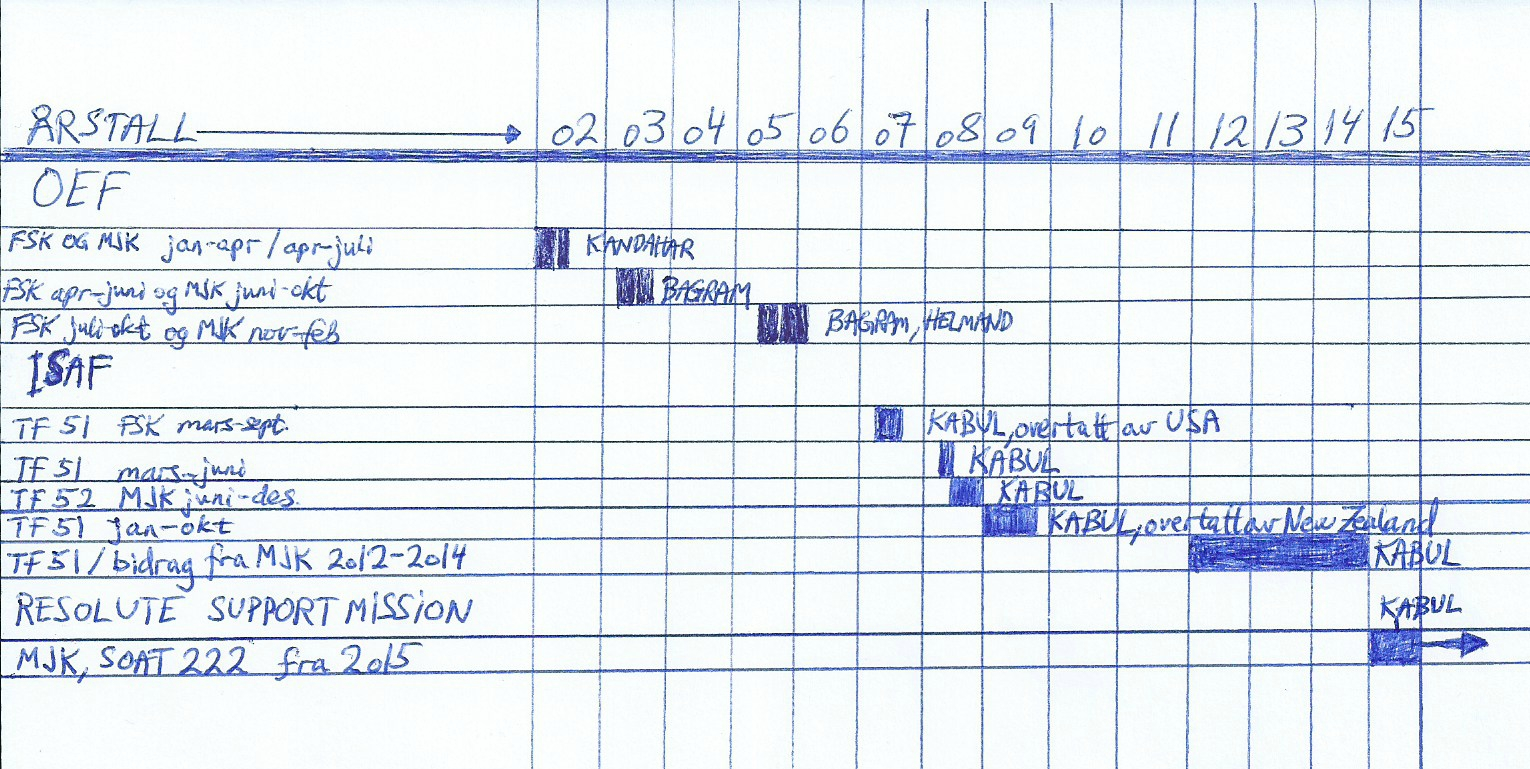 Oversikt over NORSOF sin deltakelse i Afghanistan-operasjoner i perioden 2002-2015.